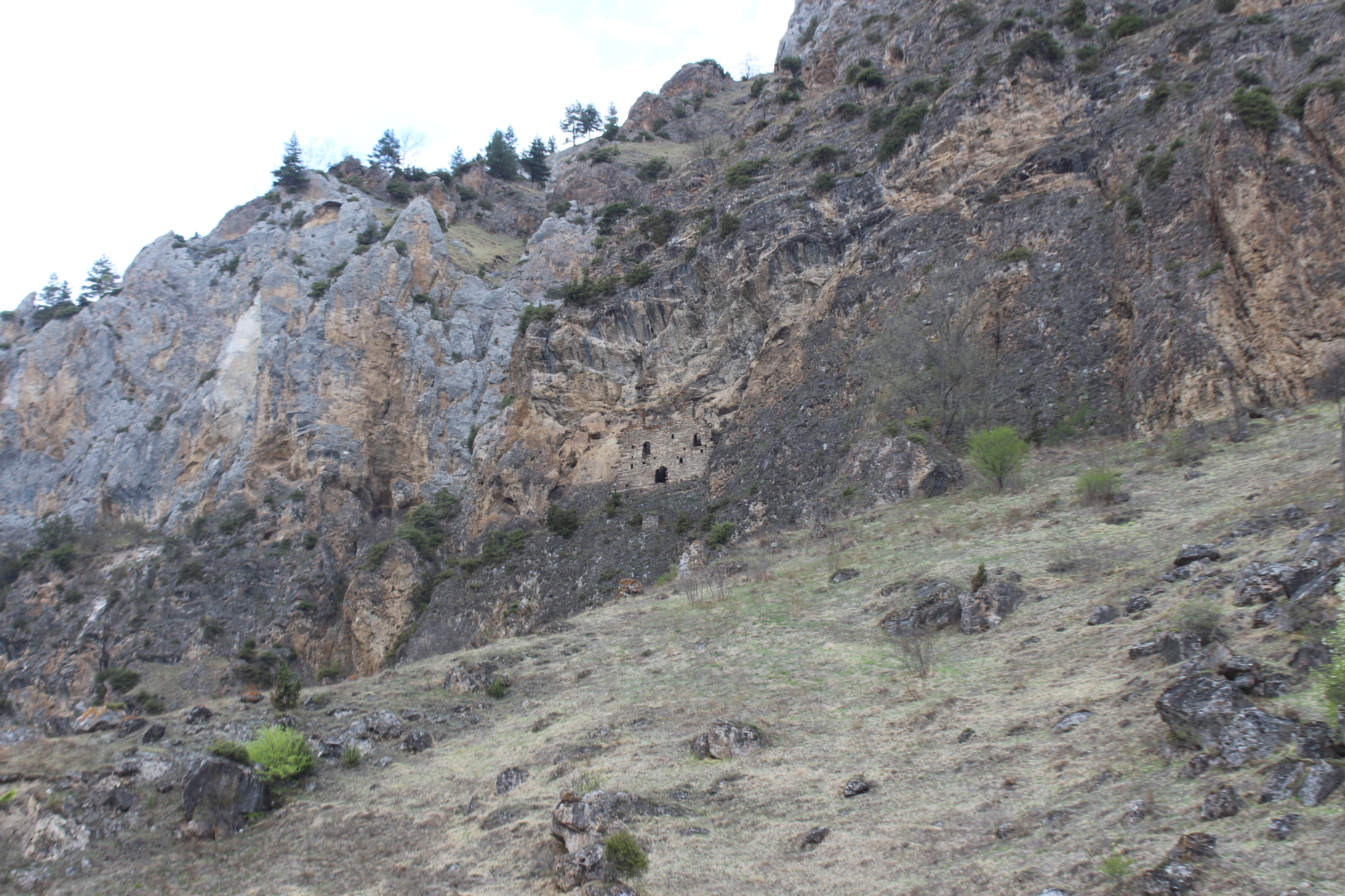 Нашха, Г1арби Г1ала находиться на севере селения Моц1ра.Г1арби, подобно тому, как делали это урарты, построил сигнально-оповещательную систему. Начав с севера, с того места, где позднее был заложен хутор Зарганчу